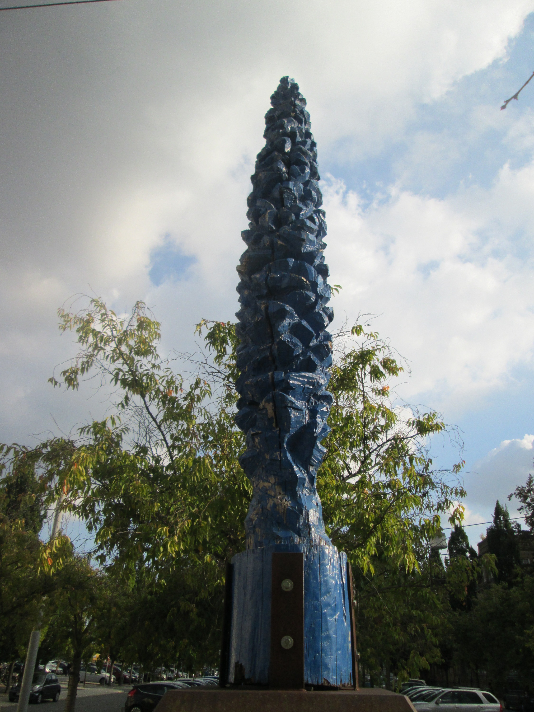 „Pyramidenpappel“ an der Bahnhofsanlage in Schwetzingen, 1997 von Stefan Pietryga, Eiche pigmentiert, Stahlsockel